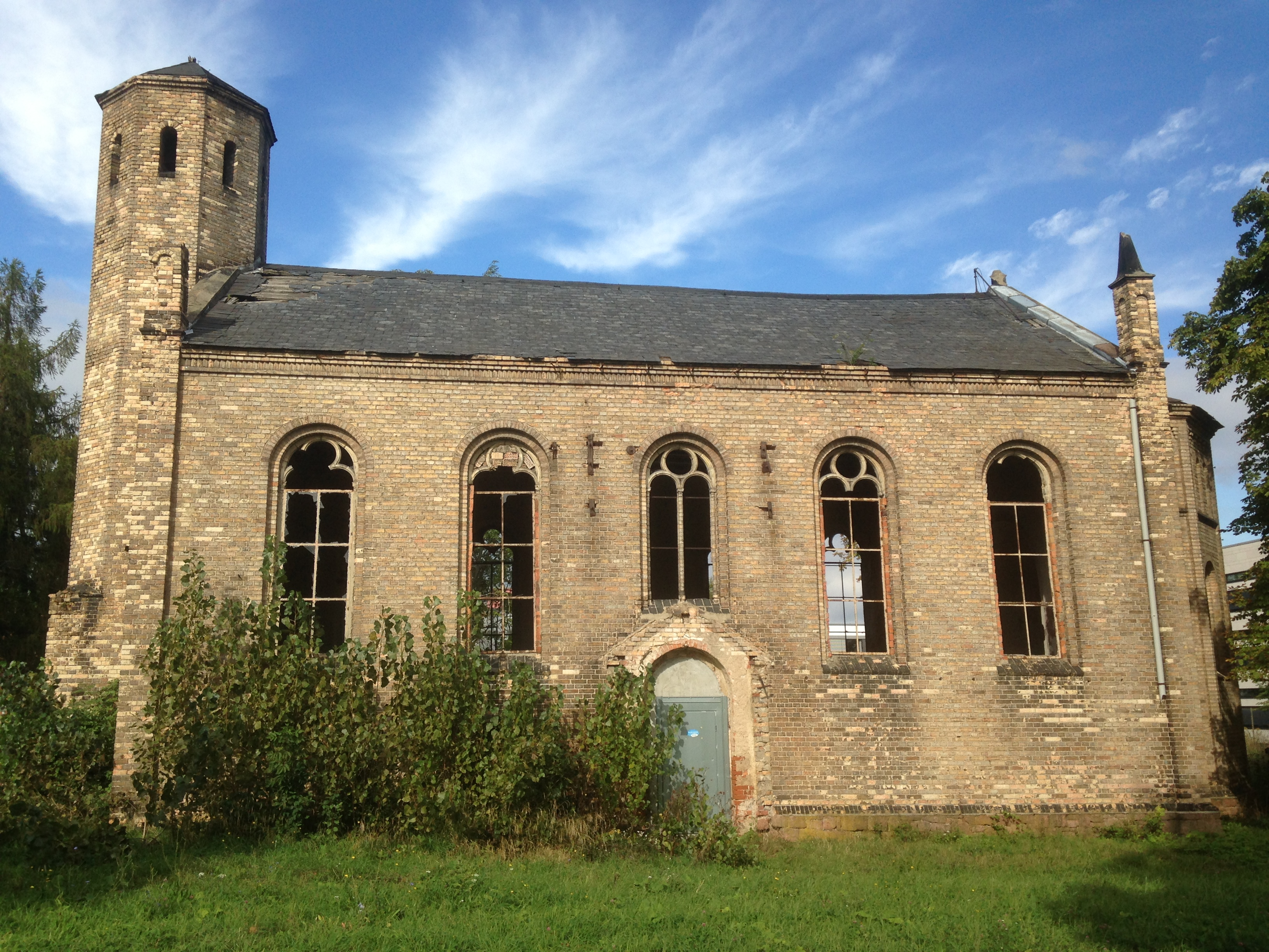 Anstaltskirche ehem. Irrenanstalt Nietleben